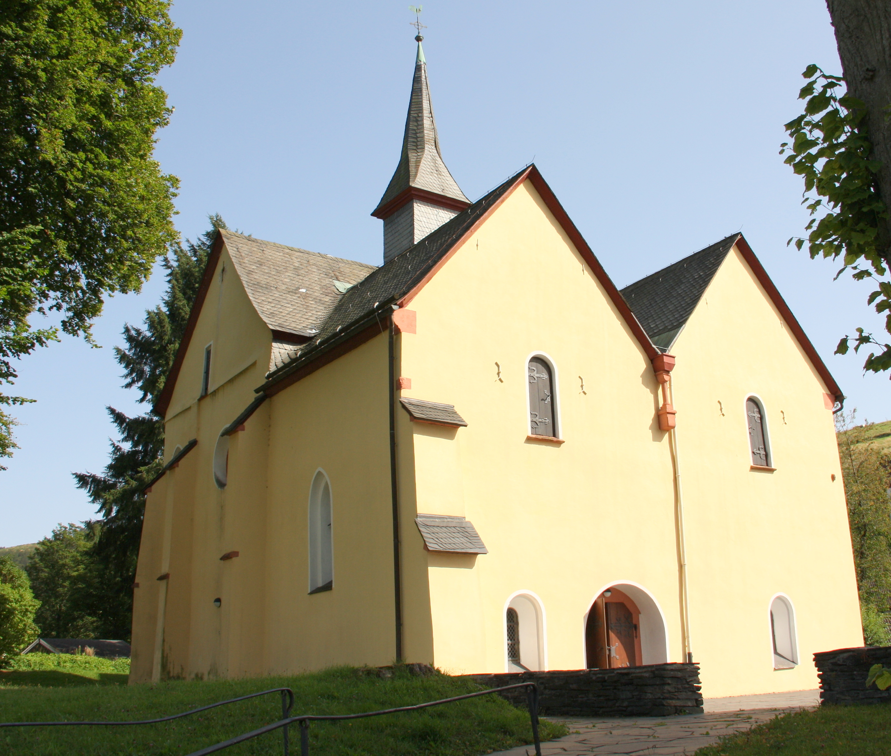 Church Bad Berleburg GirkhausenThis is a photograph of an architectural monument., no. 27